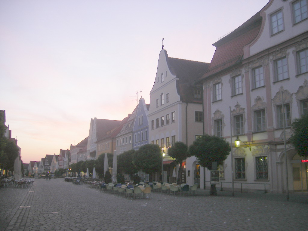 Günzburg